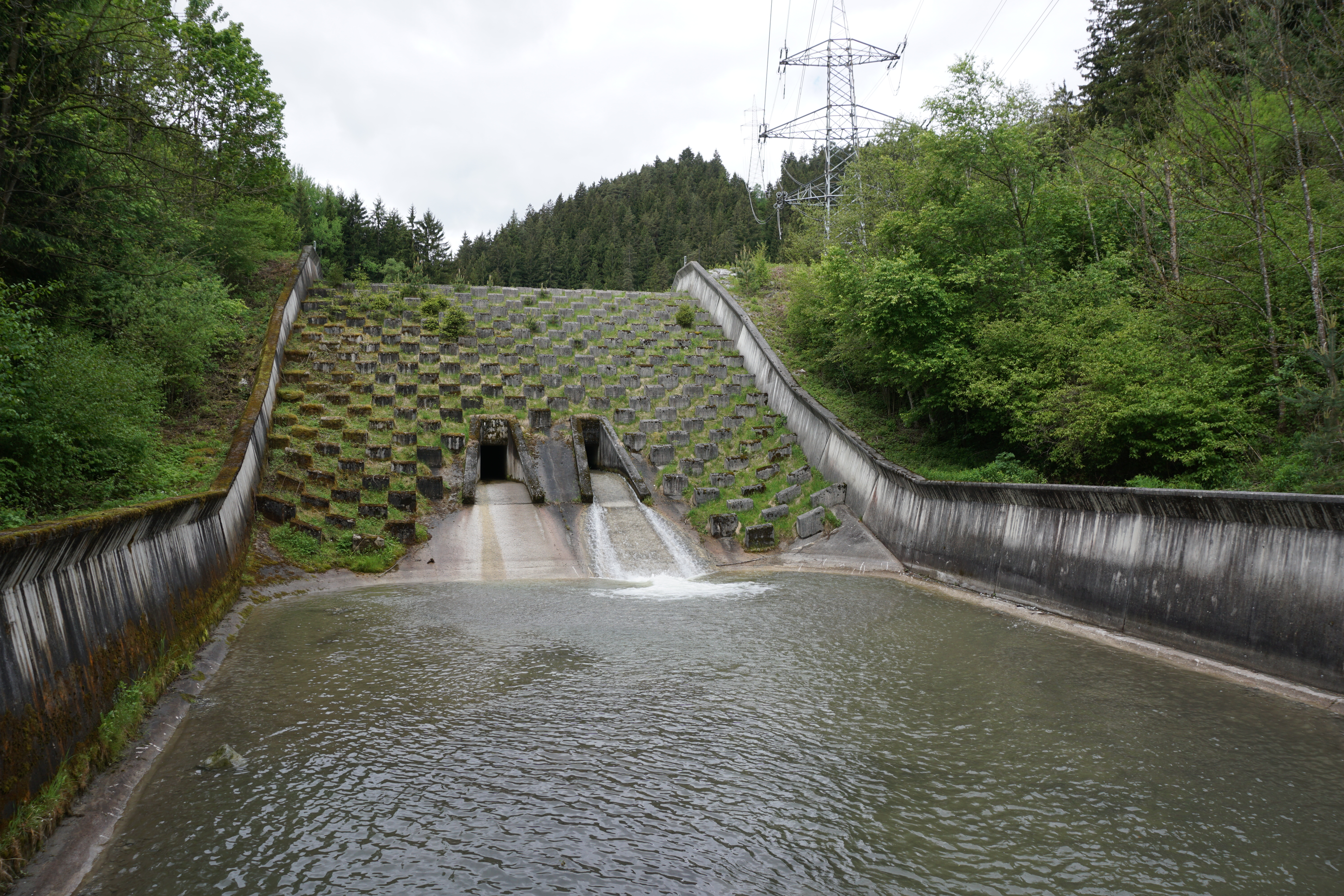 Geschiebesperre Völs